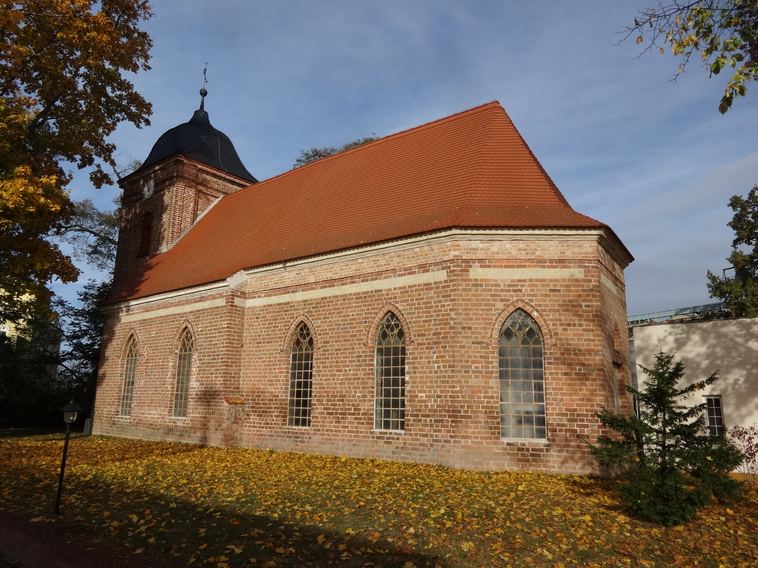 Die Kirche St. Nikolai ist eine spätgotische Backsteinkirche in Selbelang, einem Ortsteil der Gemeinde Paulinenaue im Landkreis Havelland in Brandenburg. In seinem Innern befindet sich unter anderem ein Kanzelaltar aus dem Jahr 1718.